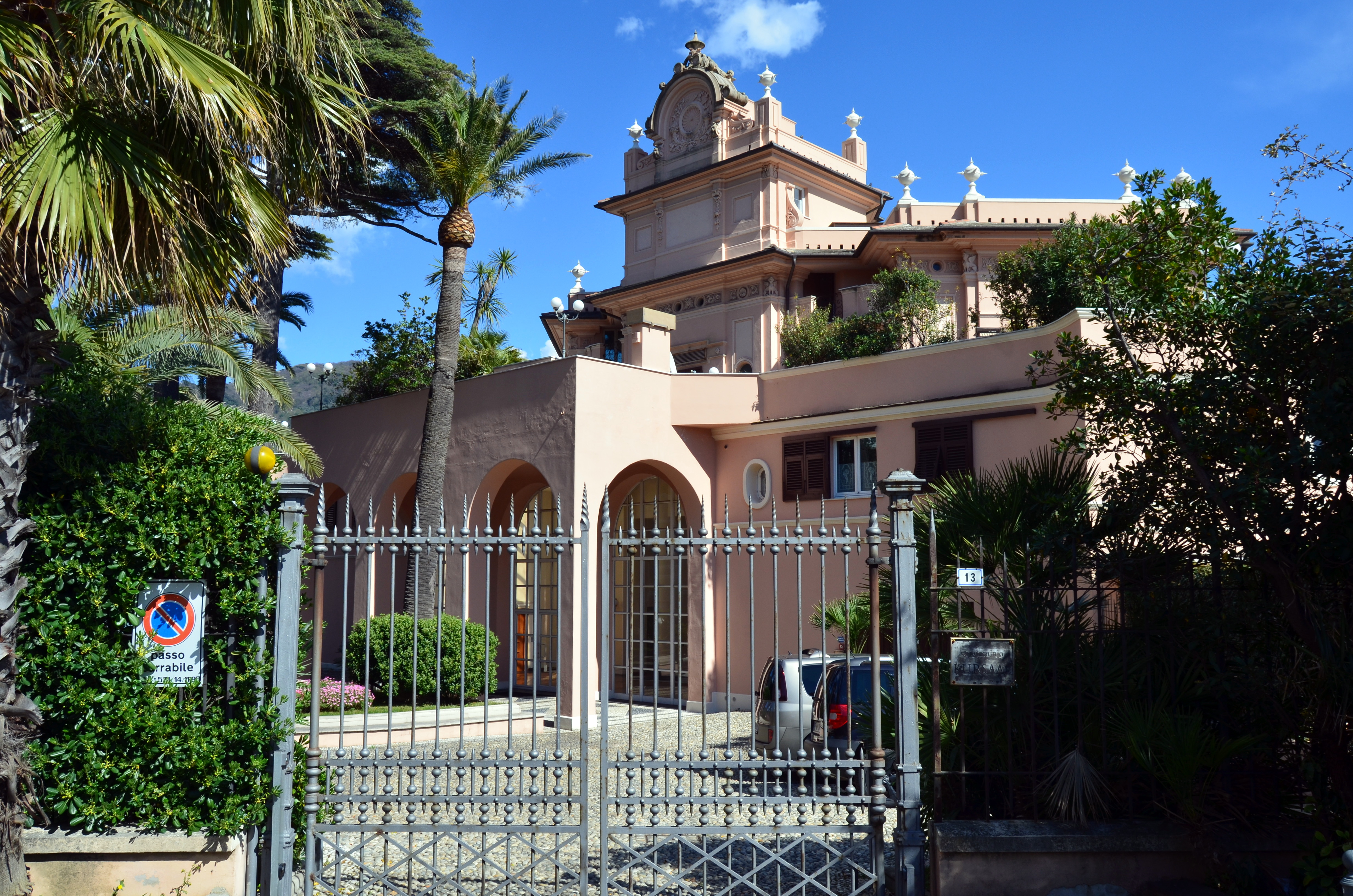 L'ex Casinò del Kursaal, Rapallo, Liguria, Italia